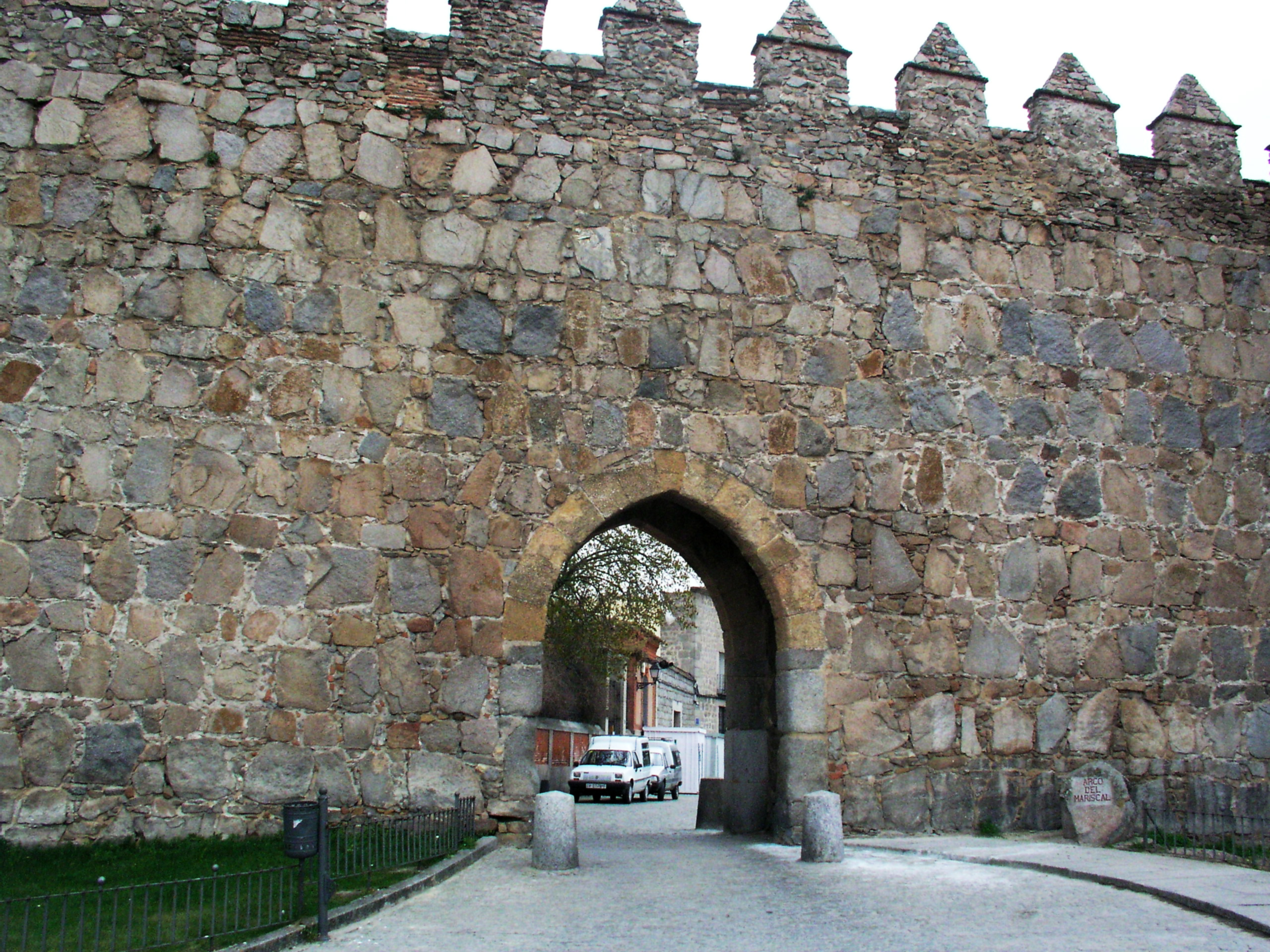 Puerta del Mariscal, Ávila de los Caballeros, Spain.